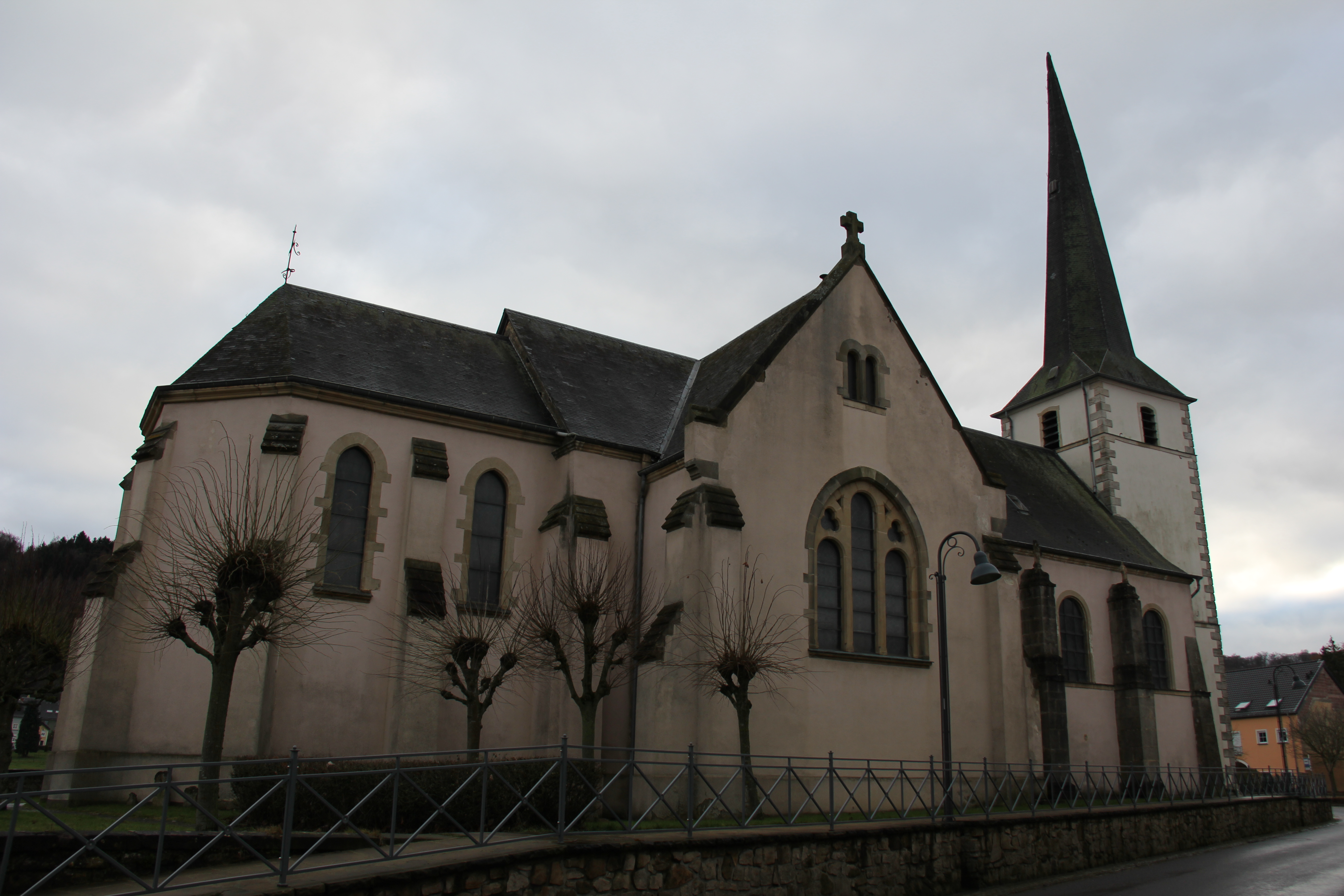 D'Kierch vu Biekerech vun der Dikrecherstrooss (N24) aus gesinn.